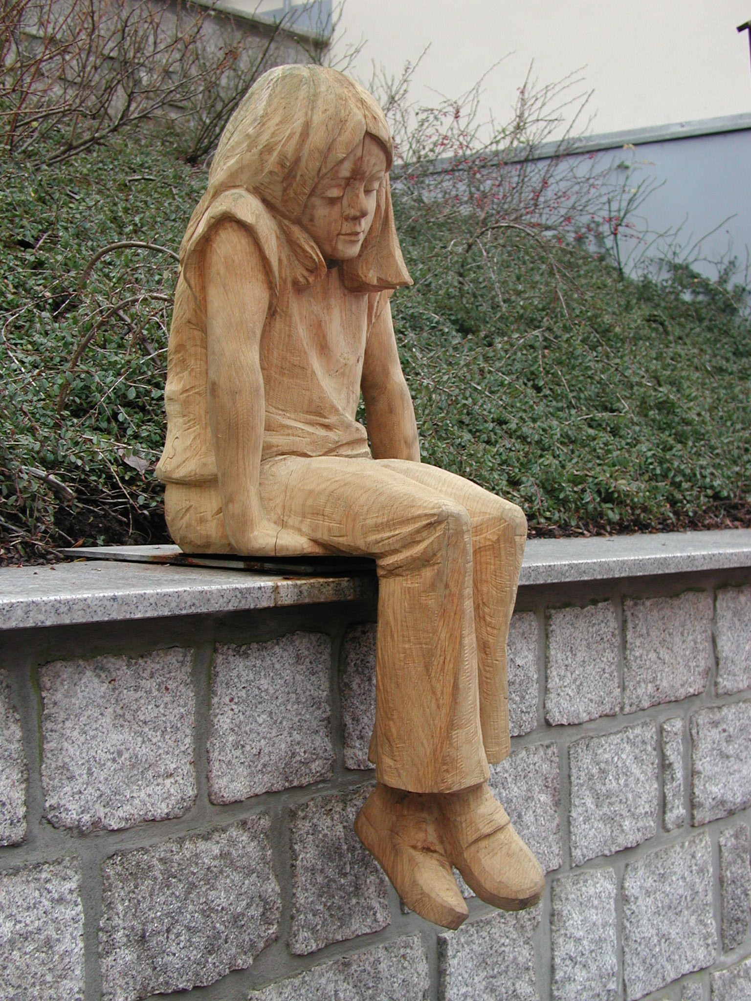 Ein Mädchen aus Holz in Aue (Sachsen)